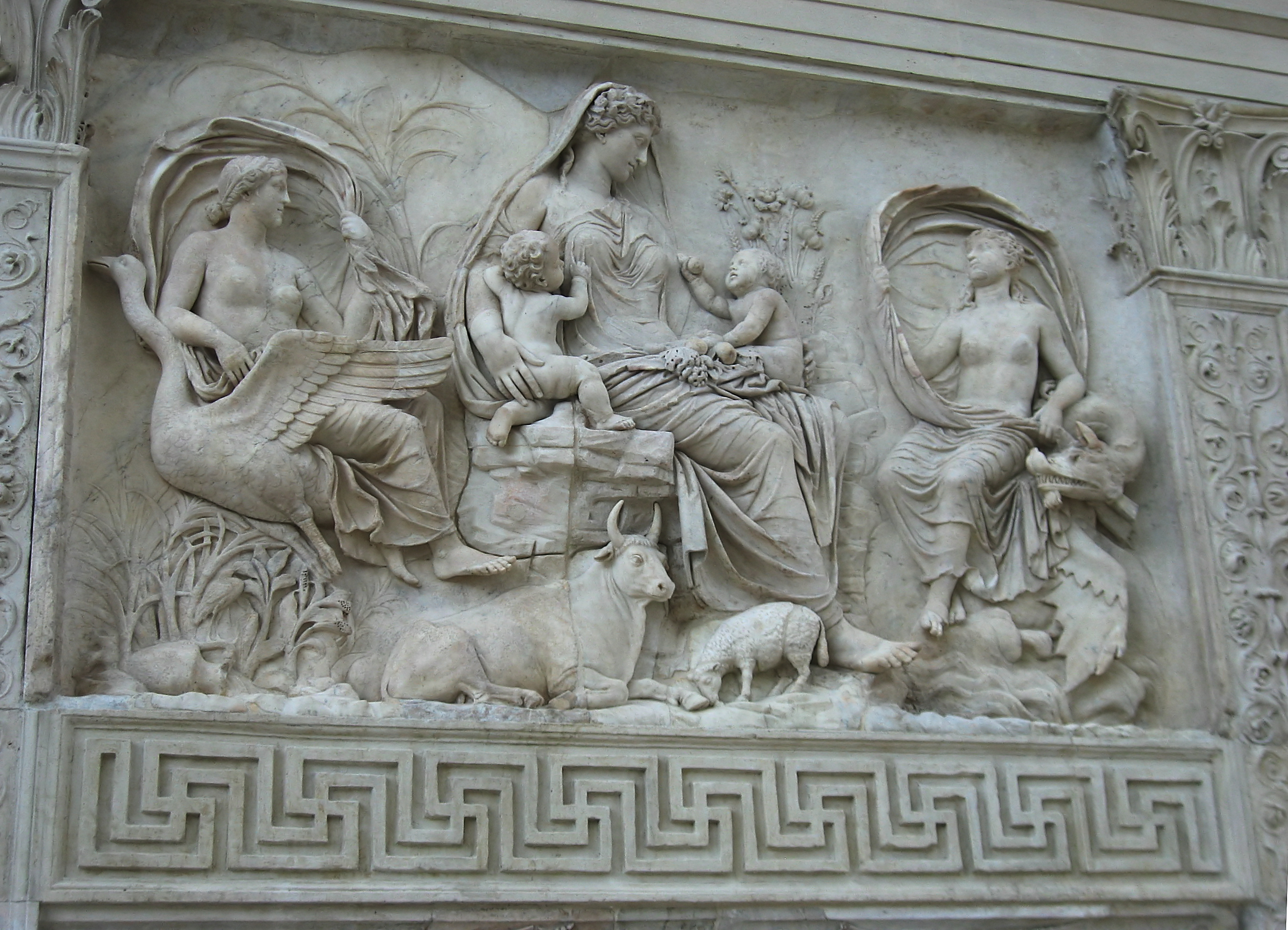 Ara Pacis in Rom/Italien - Berühmtes allegorisches Relief hellenistischer Kunstauffassung mit Darstellung der römischen Erd- und Fruchtbarkeitsgöttin Tellus zwischen den Personifikationen der Luft und des Wassers